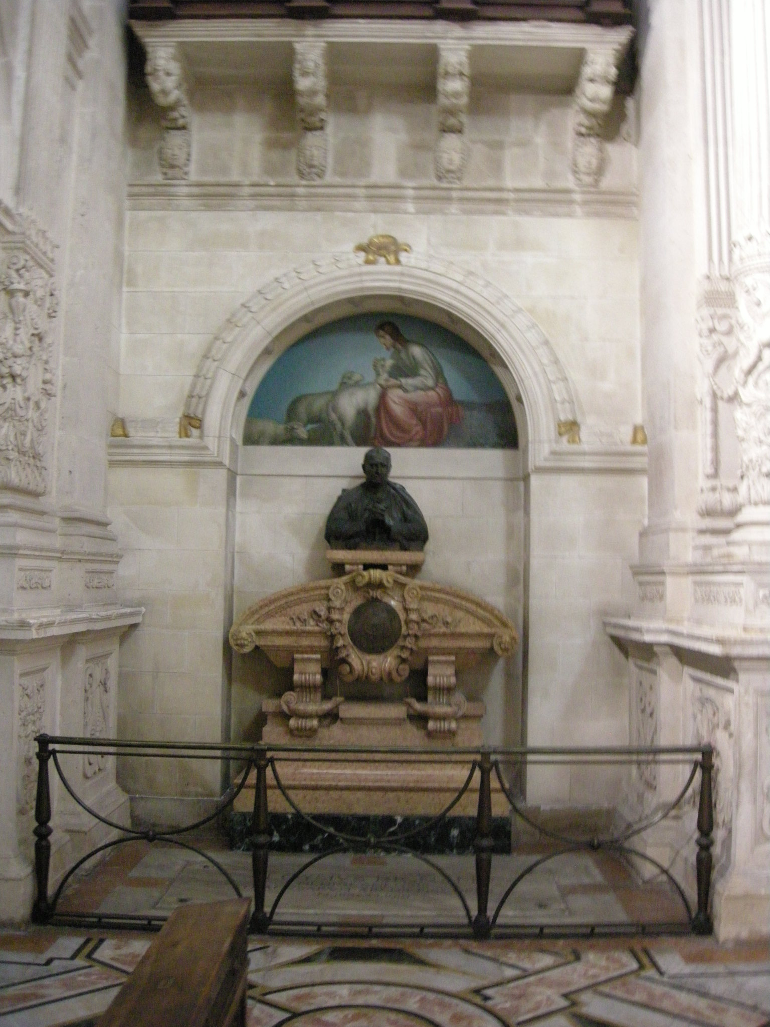 Sebastiano Agati - Tomba dell'arcivescovo di Siracusa Luigi Bignami (1862-1919) (1929). Si trova nella Cappella del Sacramento, nel Duomo di Siracusa.